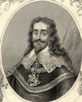 Karl I. (England)